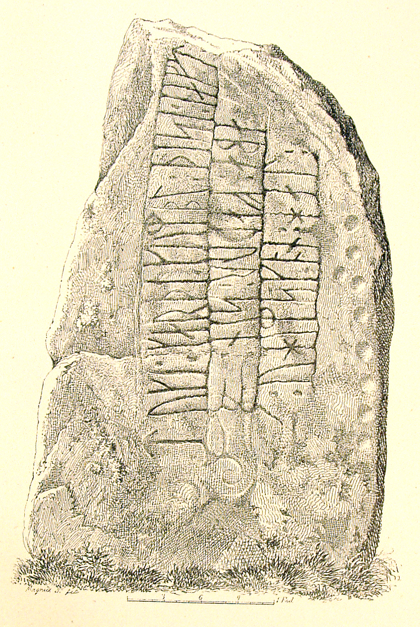 Runestenen Sønder Vissing 2 er en runesten, fundet i Sønder Vissing i 1836.